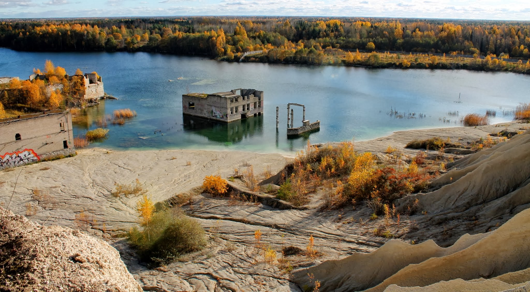 Rummu karjäärijärv on tuntud oma kristallselge puhta vee (mille tõttu järv on saanud endale hüüdnime „helesinine laguun“) ja huvitava ajaloo poolest. Murru vangla taga asuv karjäär oli kunagi täies ulatuses kuiv. Läbi aegade kaevandati seal paekivi. Põhilisteks töötegijateks olid Murru vanglas olevad vangid. Karjääri uputamine algas sisuliselt Eesti Vabariigi taasiseseisvumisega. Killustiku toodangule ei olnud enam sellises mahus nõudlust ning seoses seaduste muutumisega katkes vangide töö ja ka kogu töökorraldus paekarjääris.